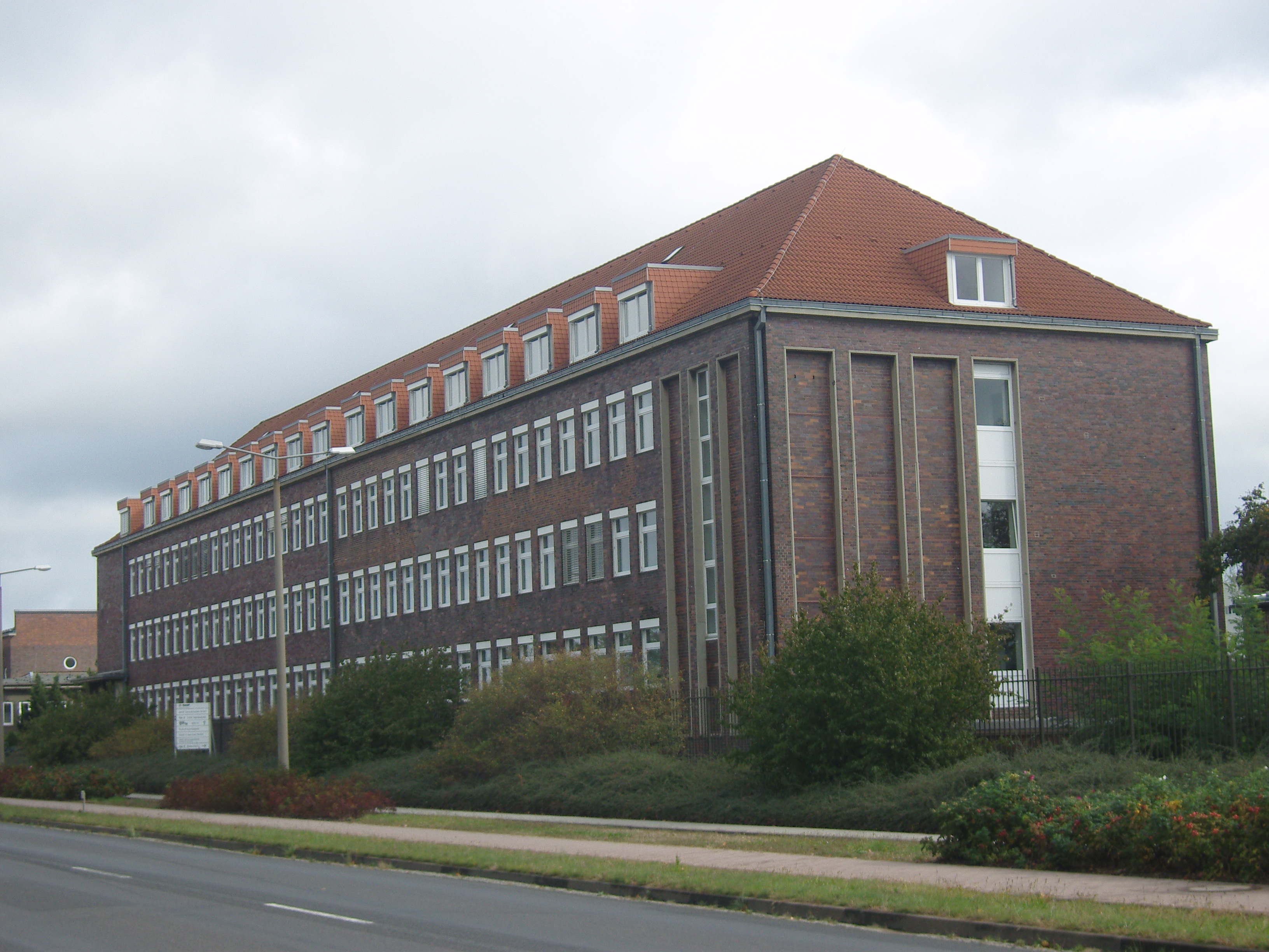 Verwaltungsgebäude der BASF Schwarzheide